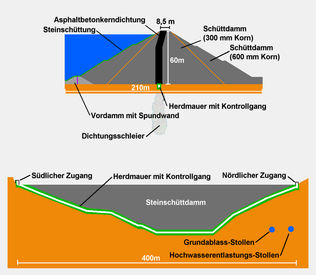 Dammquer- und längsschnitt, selbst erstellt